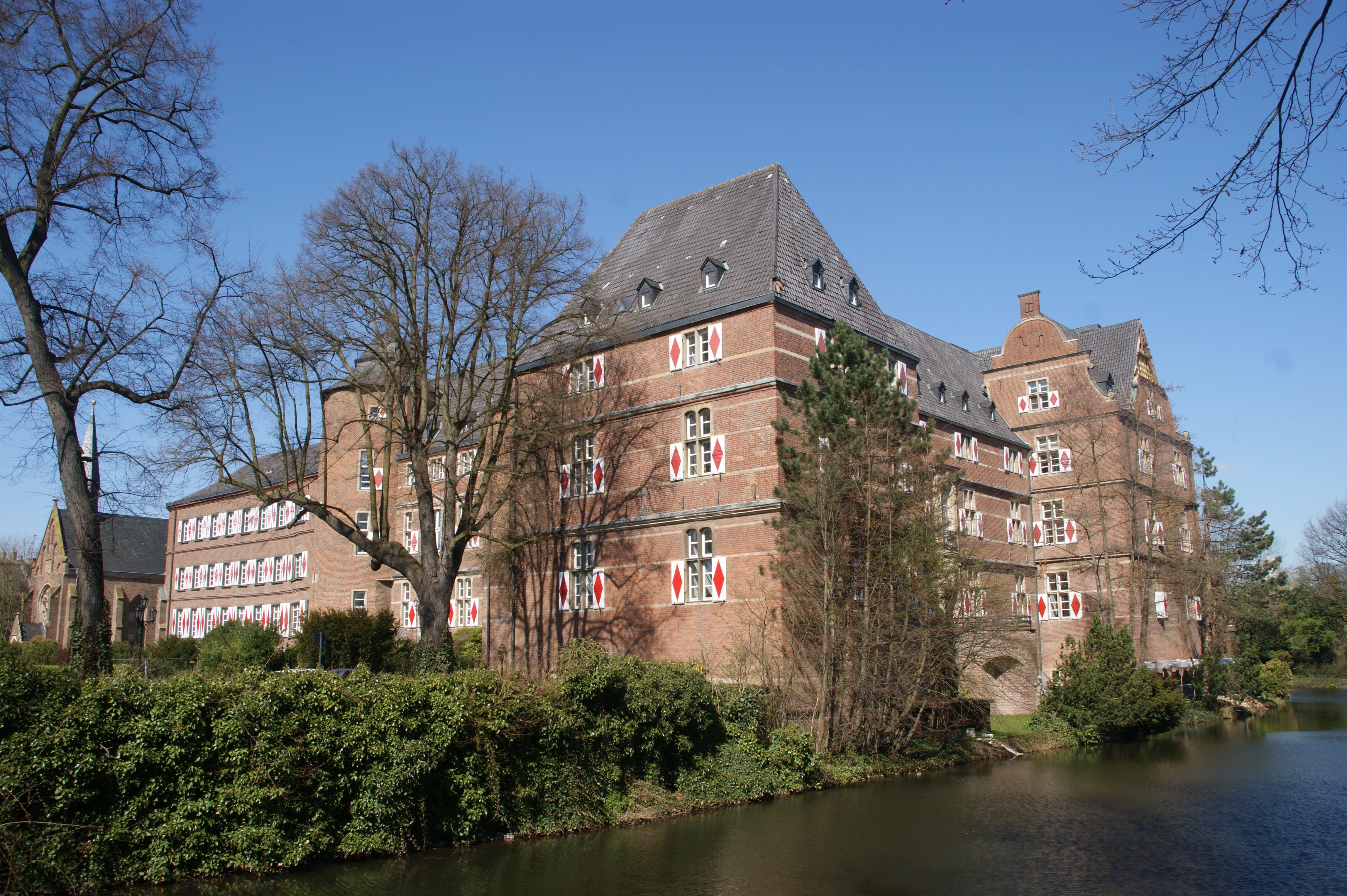 Schloss Bedburg